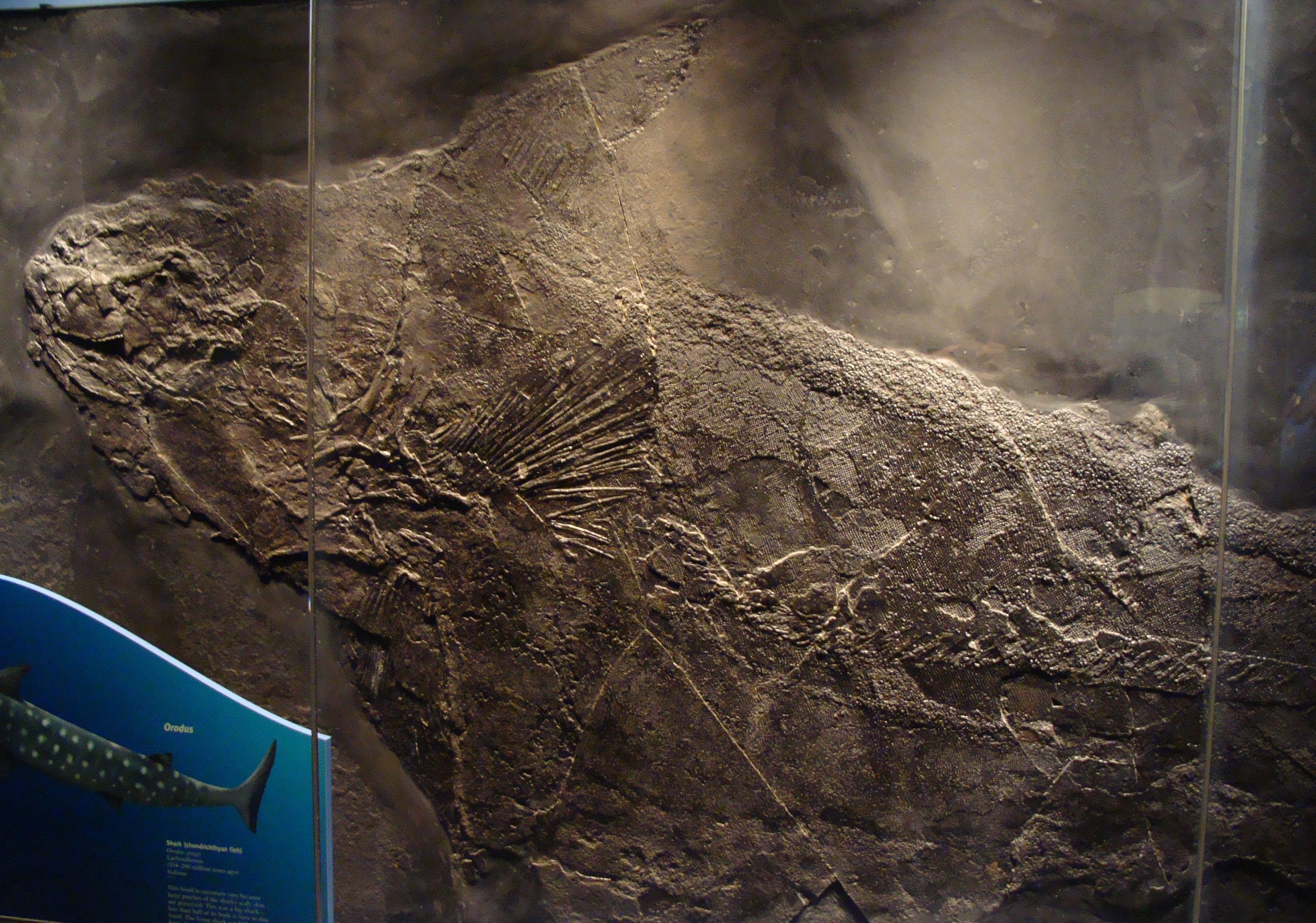 Orodus greggi in the Field Museum, Chicago.